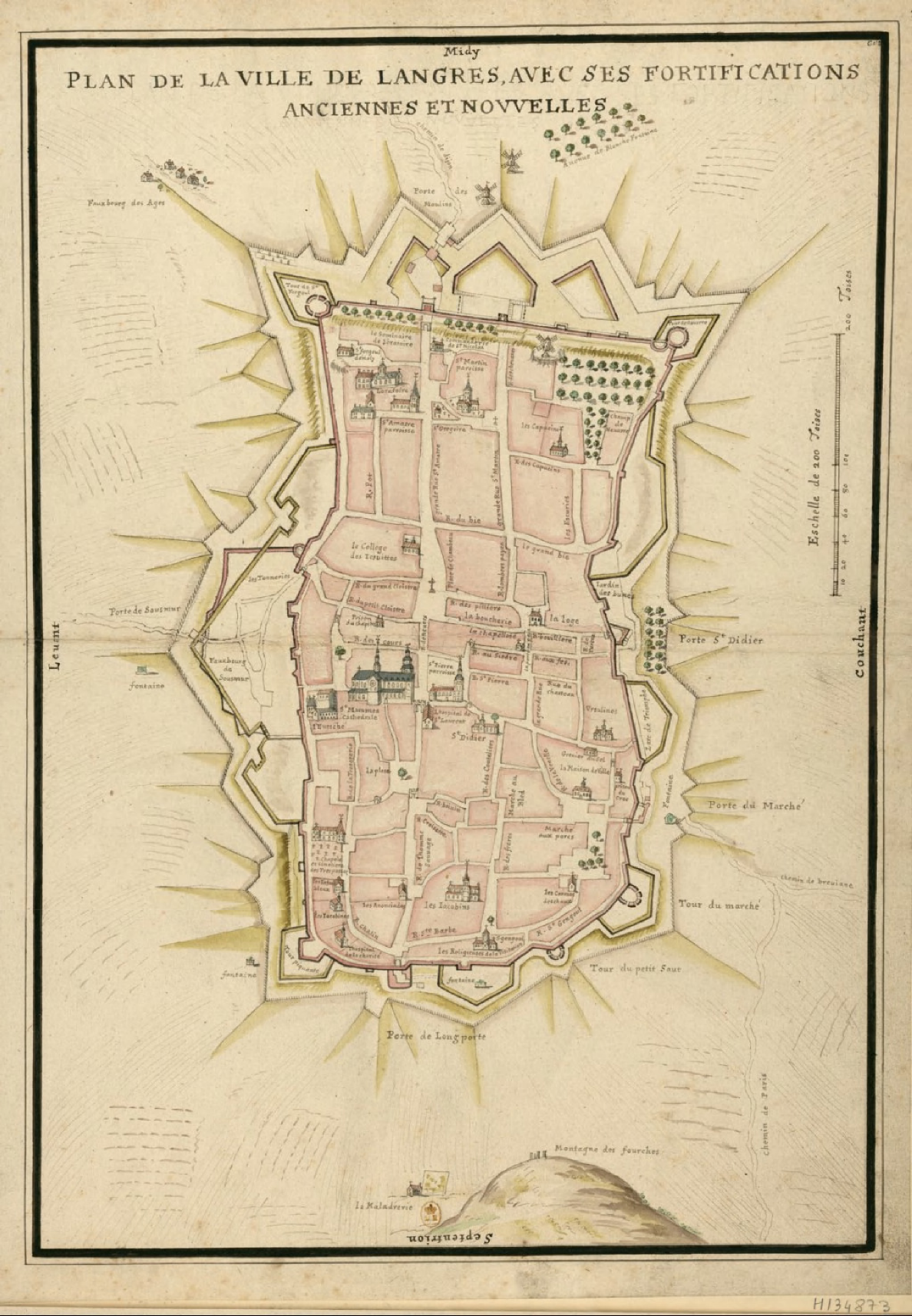 Plan de la ville de Langres, avec ses fortifications anciennes et nouvellesDessin : plume, encre de Chine et aquarelle Ancien plan de la ville de Langres. Année indéterminée. On y distingue l'ancienne tour de la cathédrale.